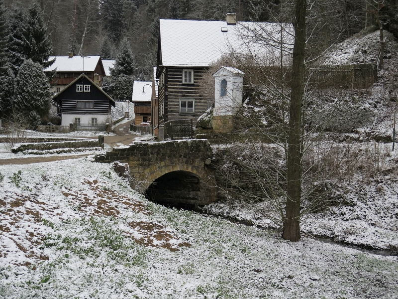 Lávka - mostek (Ráj), přes potok Pšovka, Ráj, Ráj.